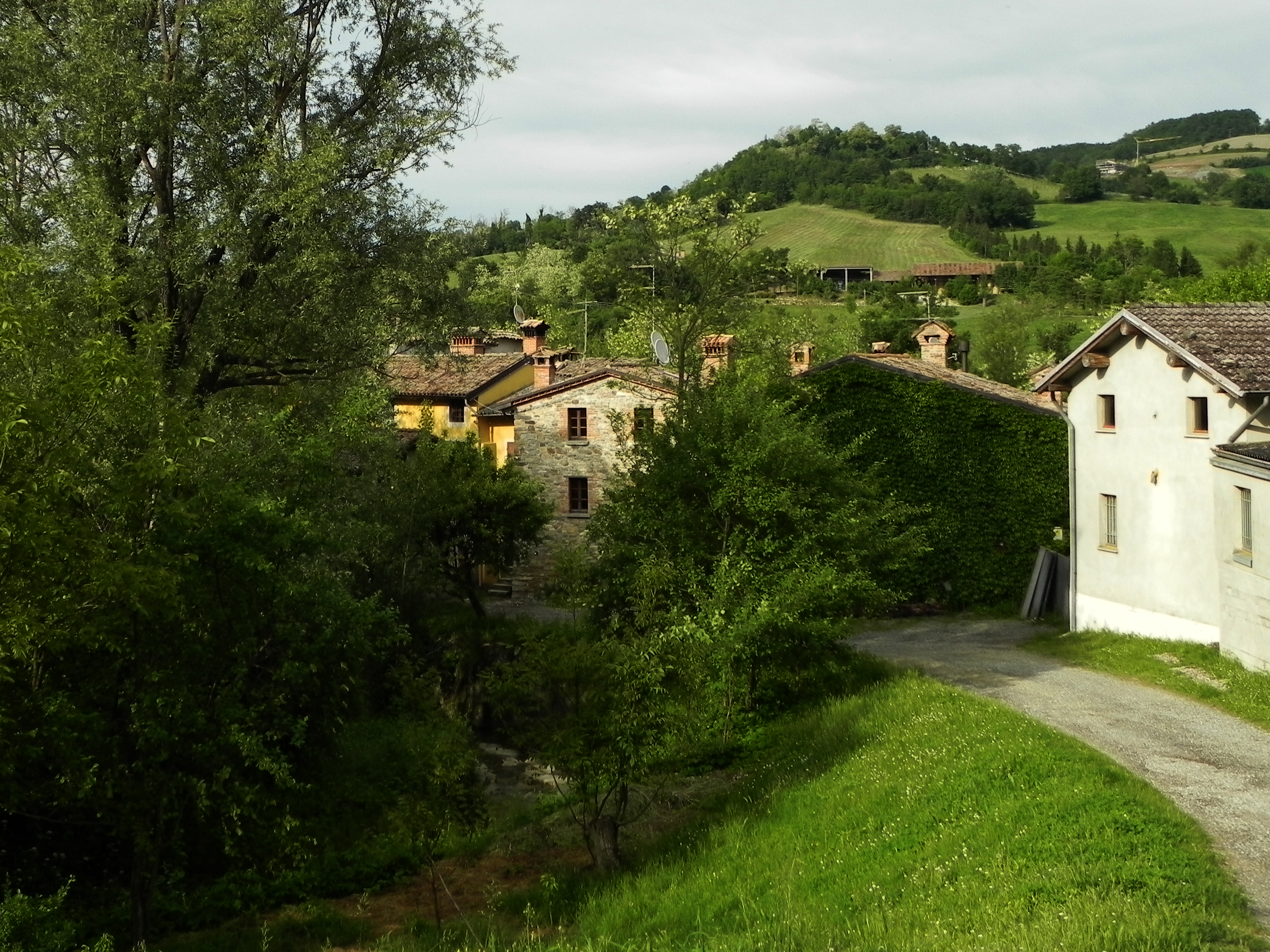 Uno scorcio della frazione di Case Gazzoli (Pianello Val Tidone, PC)